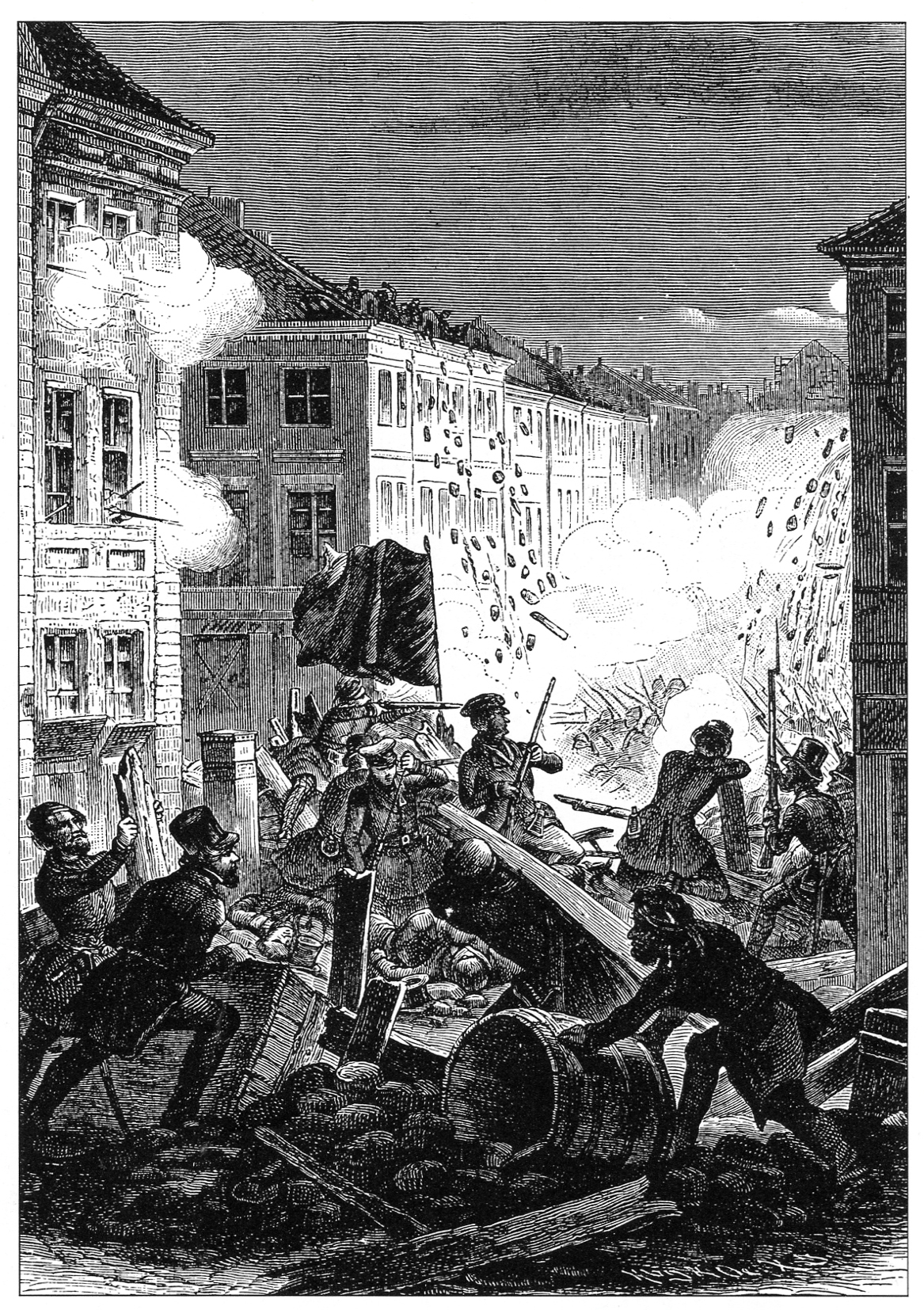 Уличный бой в Берлине 18/19 марта 1848